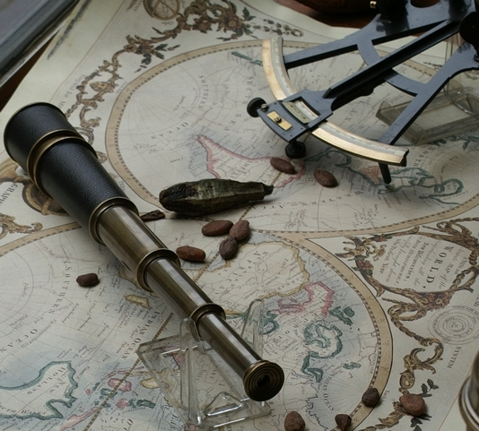 Carte et instruments de navigation (longue-vue et sextant).